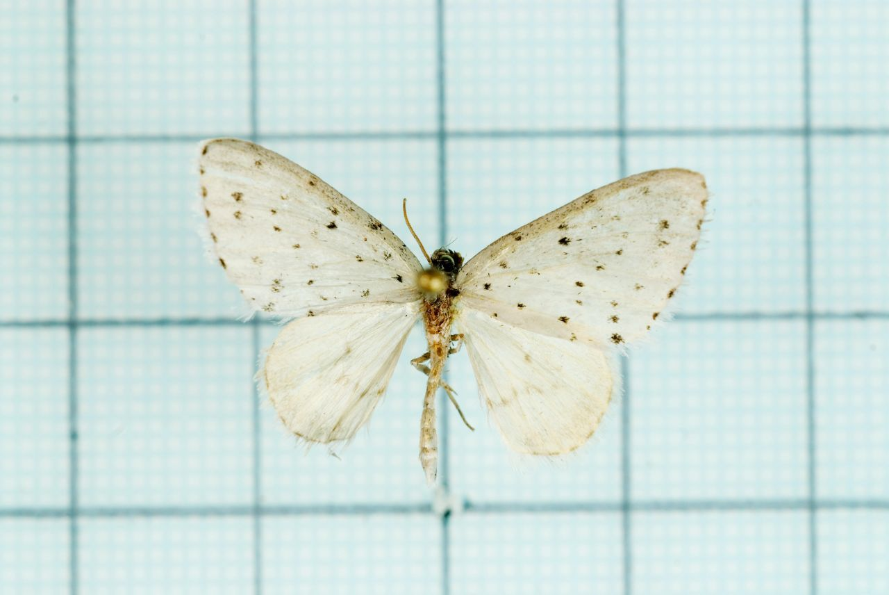 Naxidia punctata (Butler, 1880) 胡麻斑白波尺蛾 臺灣尺蛾科圖鑑１ P.222 鞍1:P.52 male